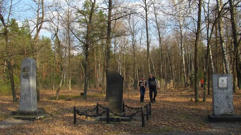 Ленін (Жыткавіцкі раён). Яўрэйскія могілкі